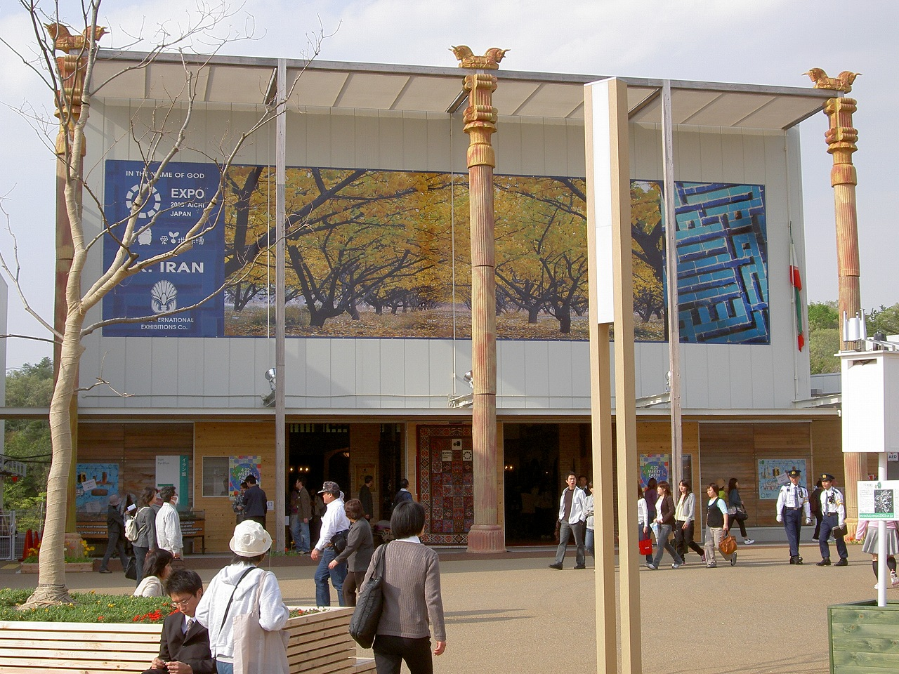 EXPO2005 Iran pavilion